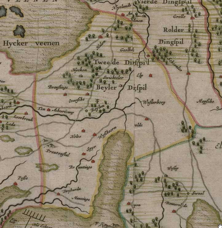 Oude kaart van Drenthe uit 1634 (fragment)